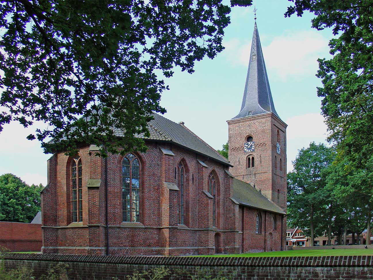 Kerk van Zuidlaren